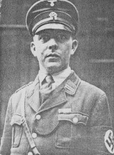 SS-Scharführer Wilhelm Helten, Junkerschule Braunschweig, KZ Dachau